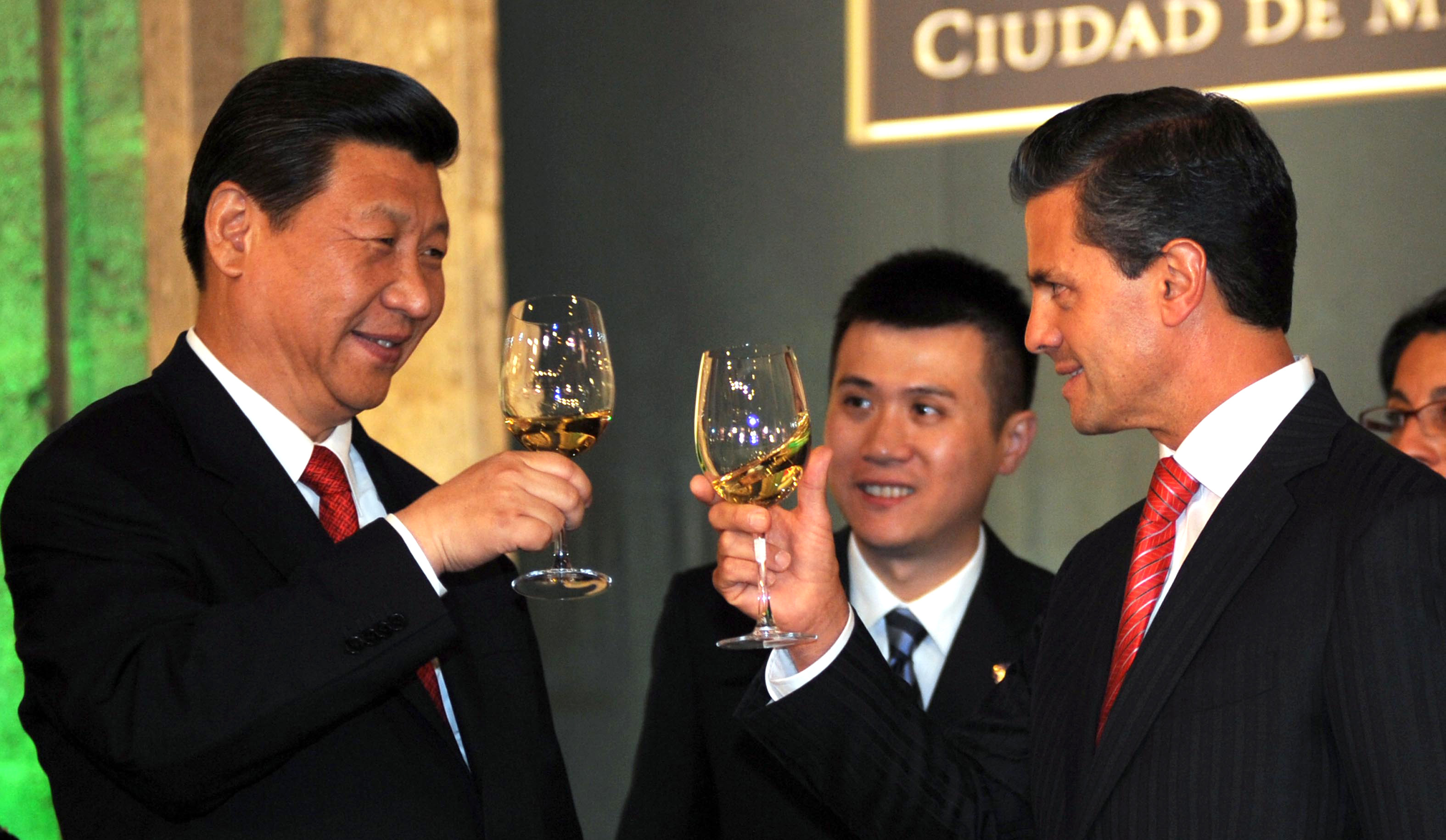 Cena de Estado que en honor del Excmo. Sr. Xi Jinping, Presidente de la República Popular China, y de su esposa, Sra. Peng Liyuan. Palacio Nacional, Ciudad de México. 4 de junio de 2013.